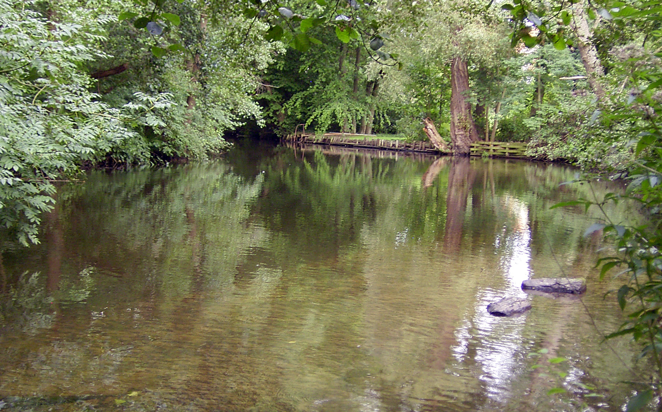 Ilmenau nahe Uelzen